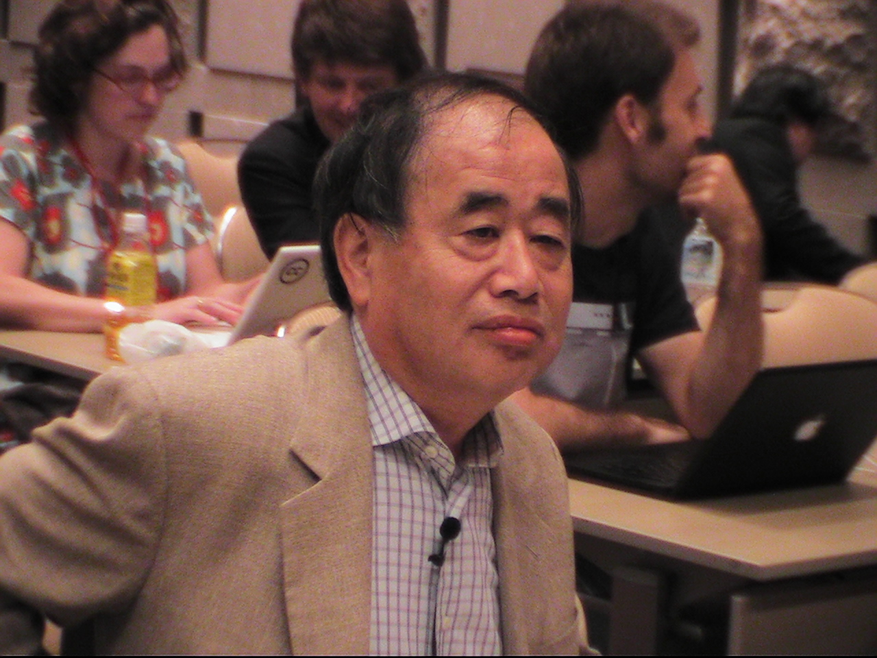 Tsuguhiko Kadokawa, Chairman of Kadokawa Group Holdings, Inc. in iSummit '08.